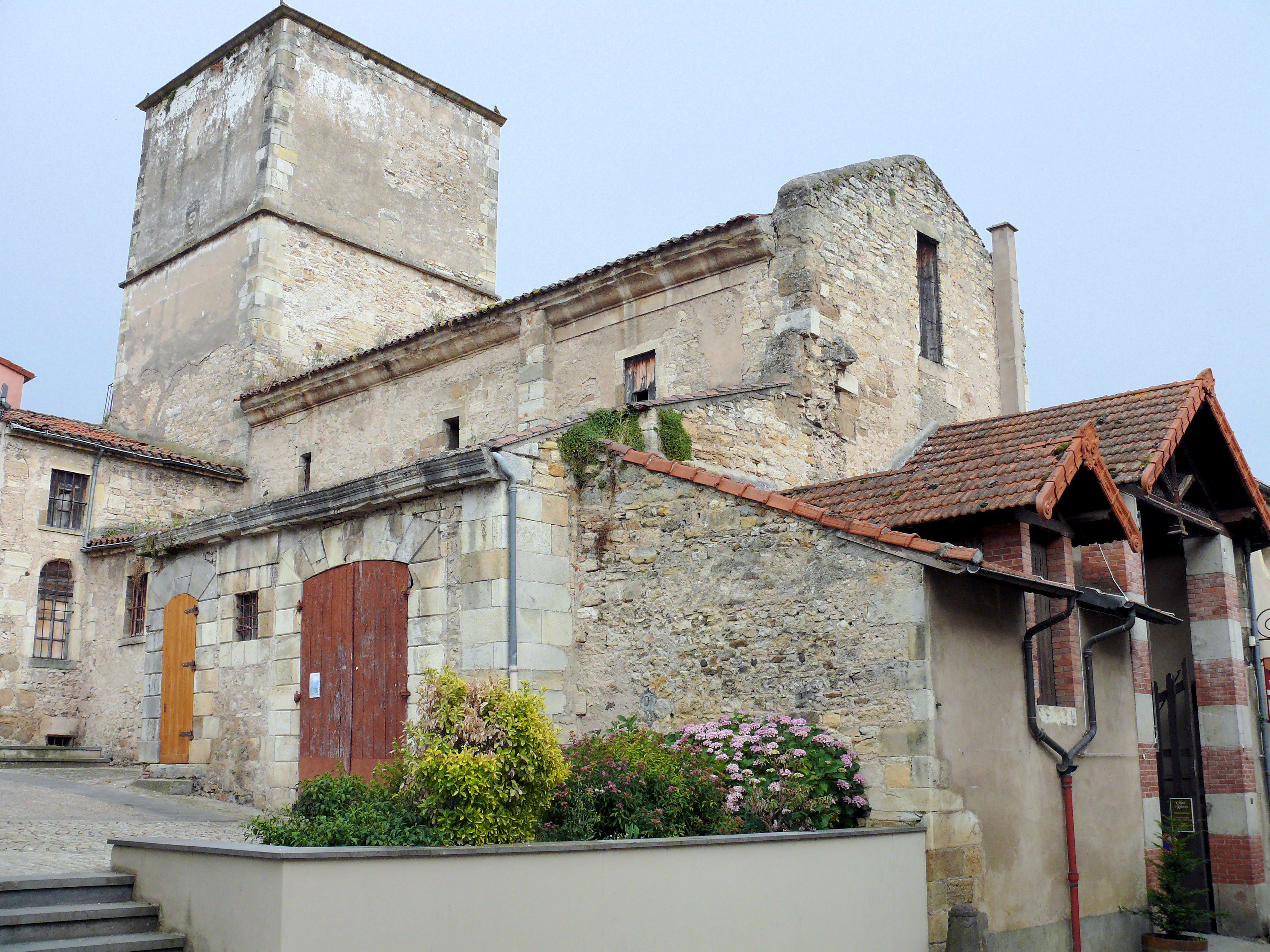 Chauriat Ancienne église paroissiale Sainte-Marie